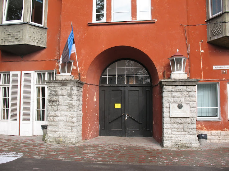 Kose-Lükati vabaõhukool, 1937. a.